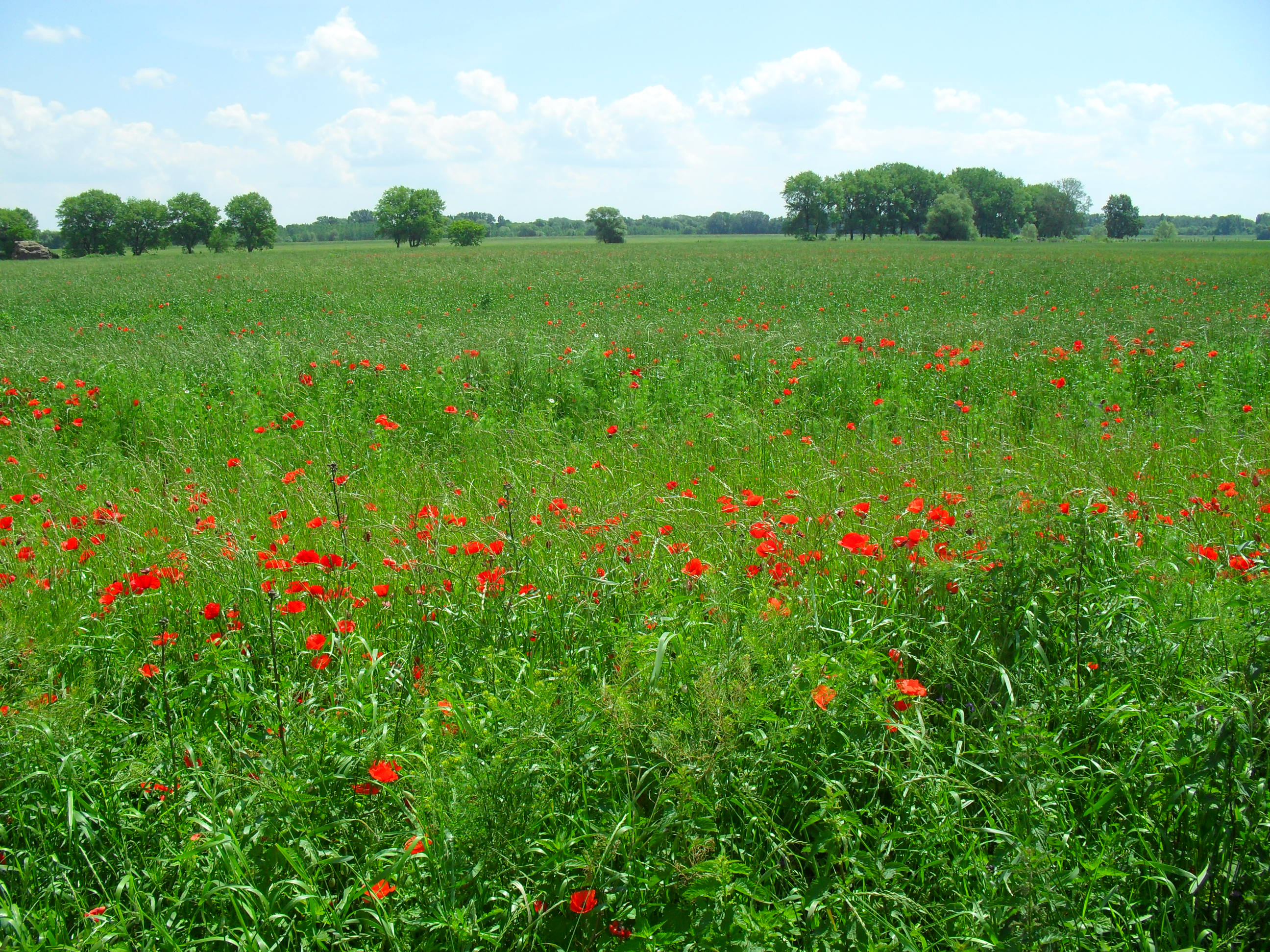 Gúta/Csörgő - tájkép